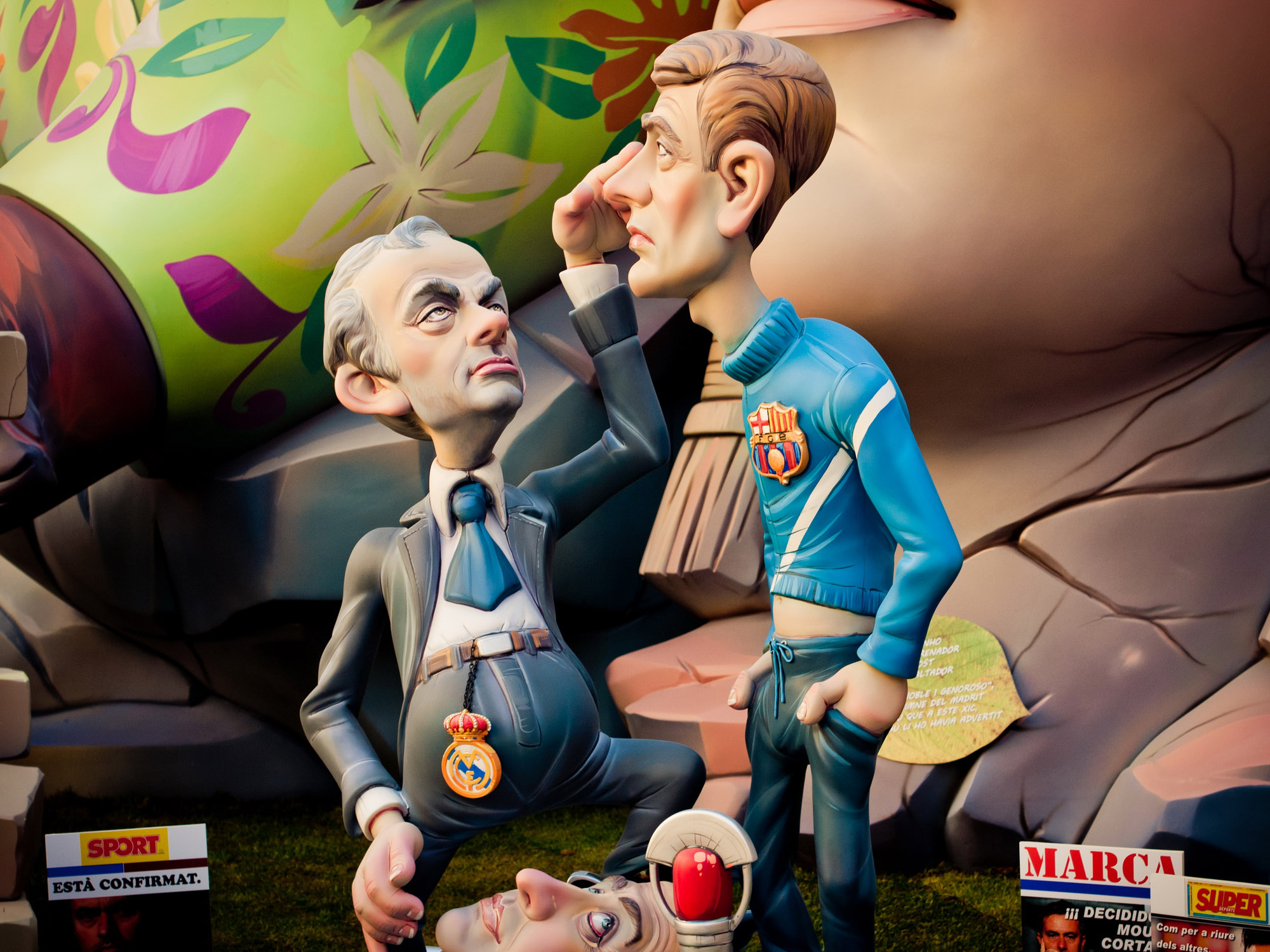 Ninot a la falla del Pilar on veiem a Mourinho ficant-li el dit a l'ull a Tito Vilanova.